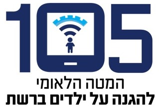 לוגו המטה הלאומי להגנה על ילדים ברשת - מוקד 105